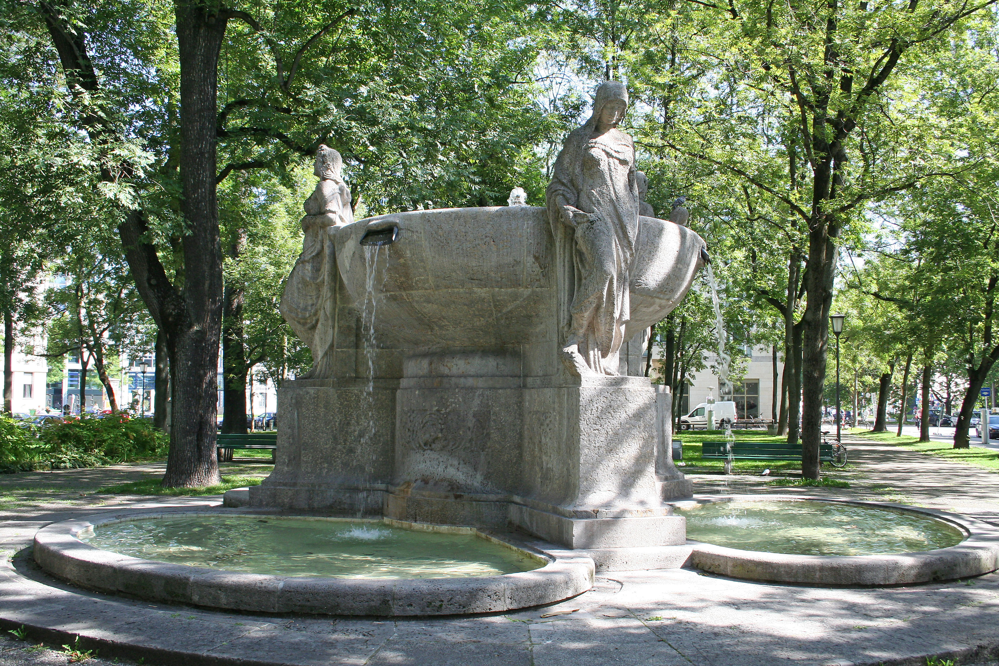 Hubert Netzer, Nornenbrunnen in München.